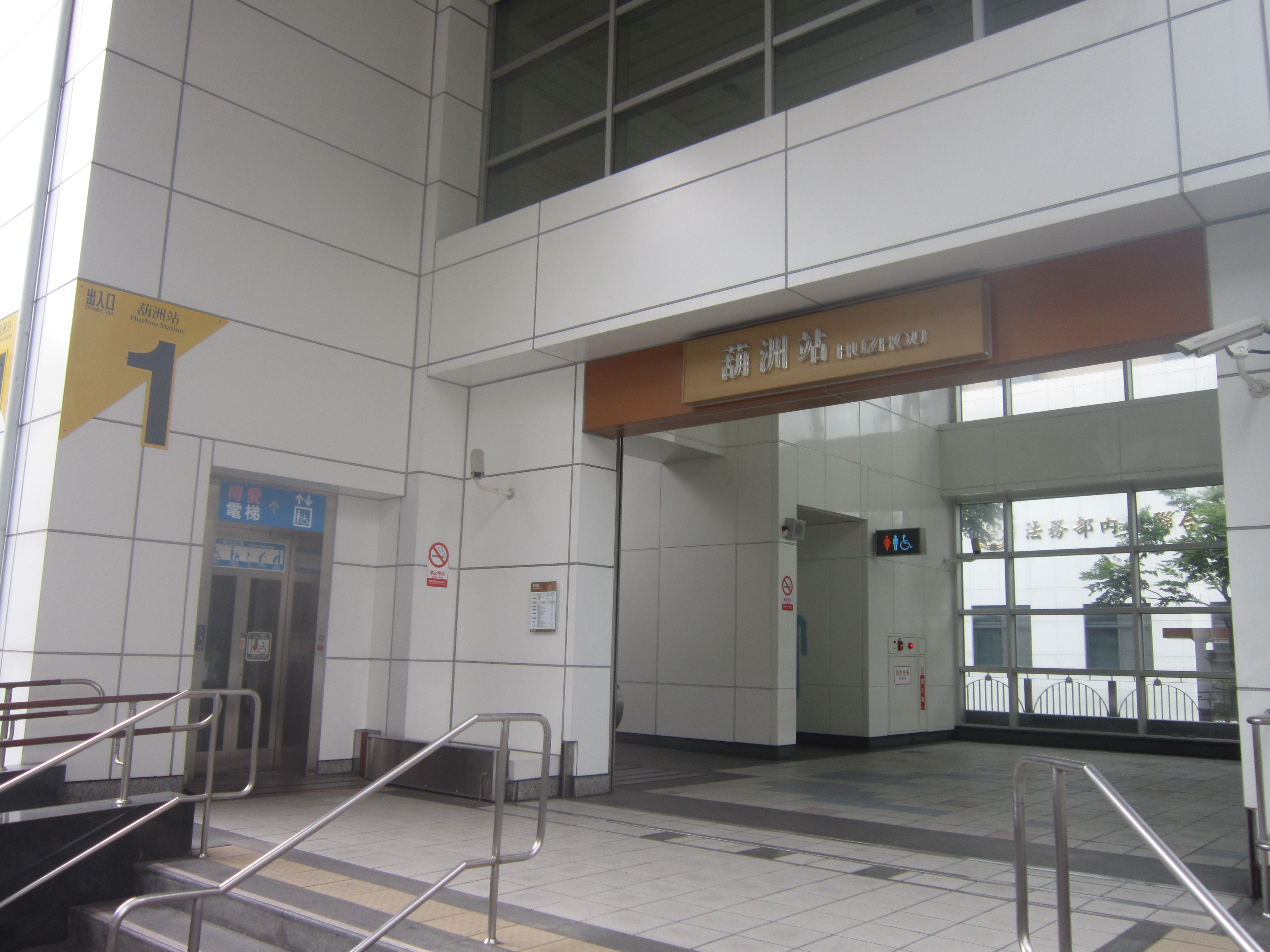 捷運葫洲站一號出入口